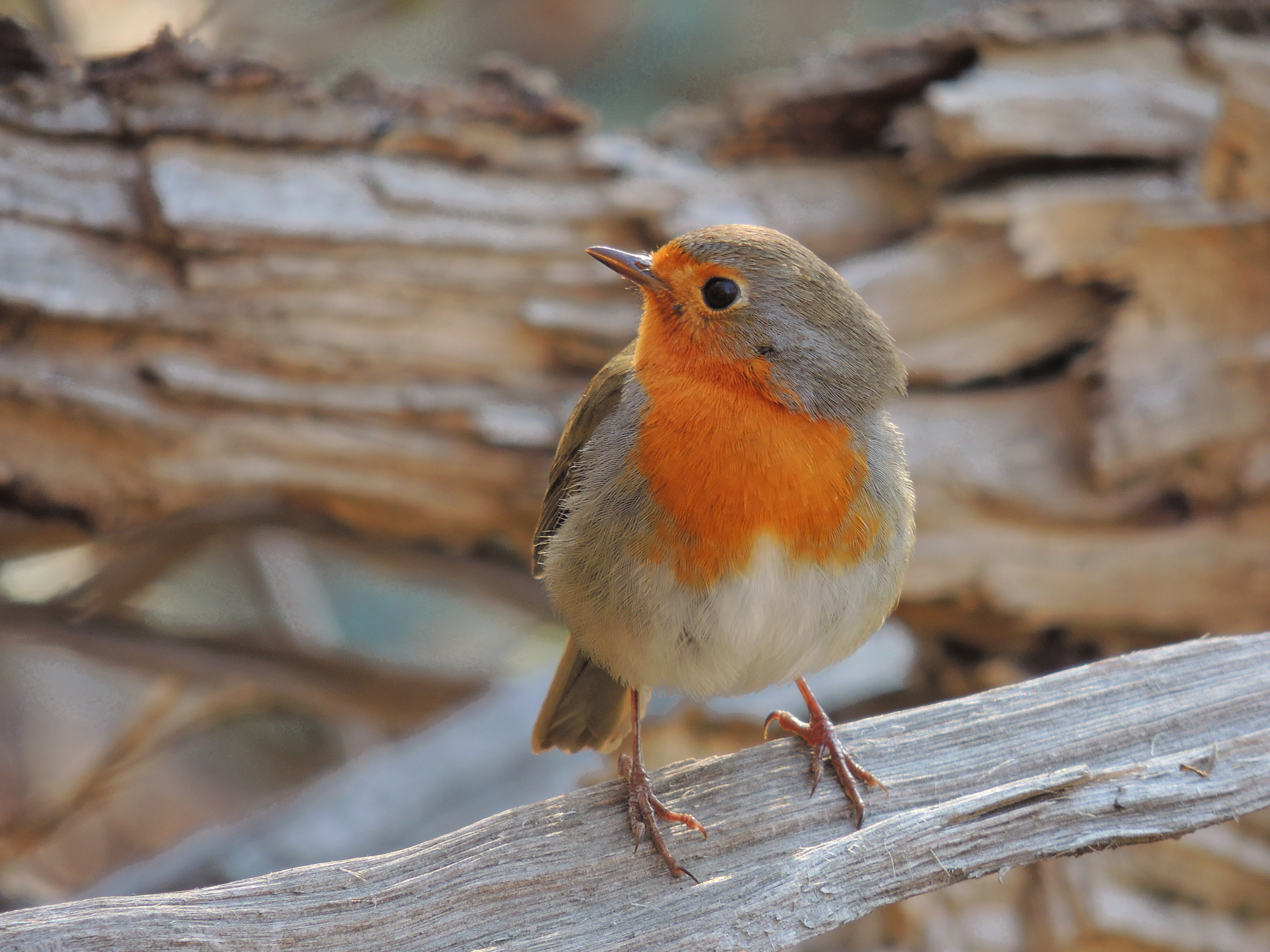 robin Rotkehlchen măcăleandru